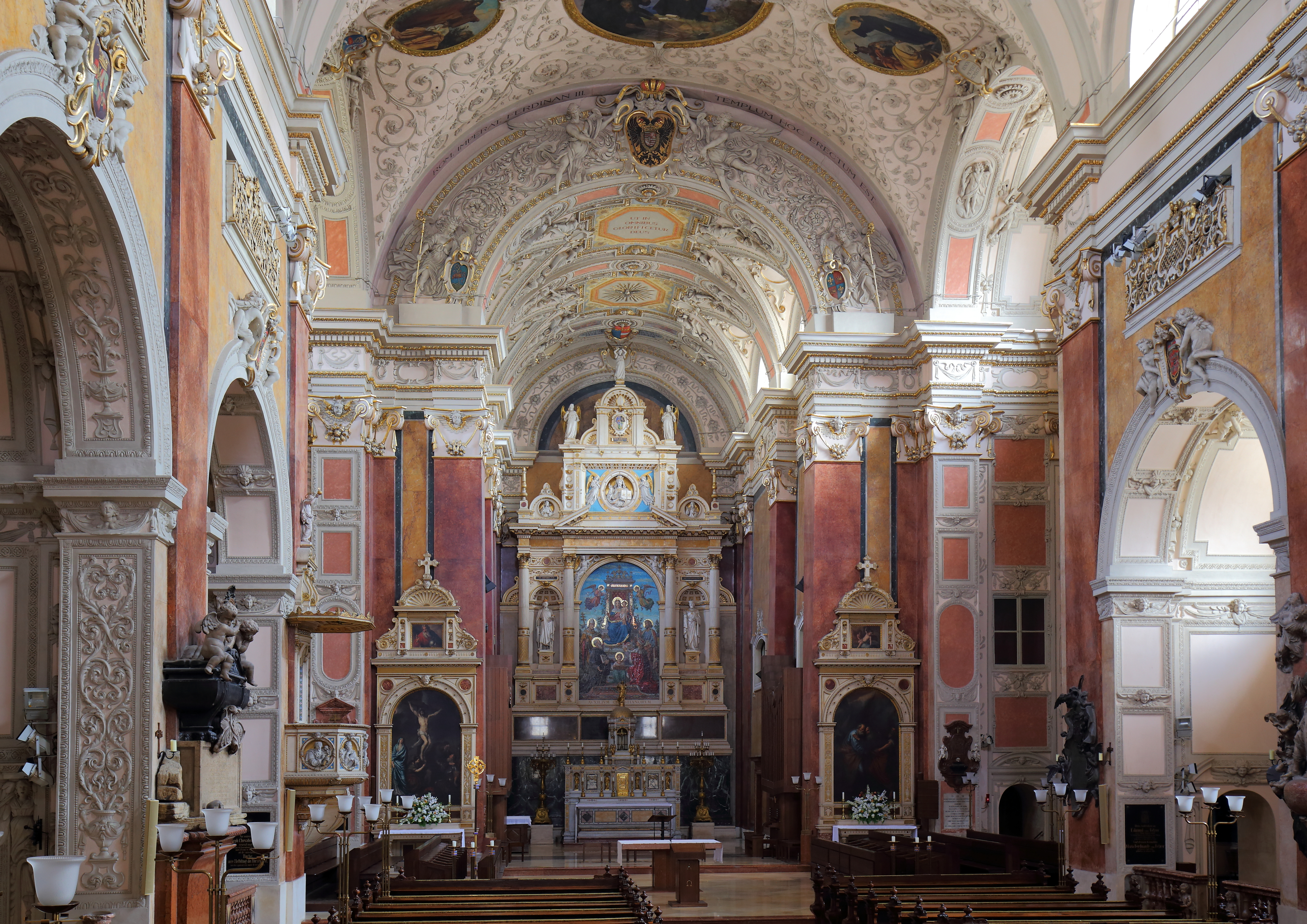 Innenansicht Richtung Hochaltar der Schottenkirche im 1. Bezirk der Bundeshauptstadt Wien. Im Zuge der Restaurierung und teilweise Umgestaltung in den Jahren 1883 bis 1887 entstand der neue Hochaltar nach Entwürfen von Heinrich Ferstel mit einem Mosaik von Michael Rieser. Am Triumphbogen das Wappen von Abt Sigismund Schultes, über dem Hochalter das Wappen von Abt Ernest Hauswirth.